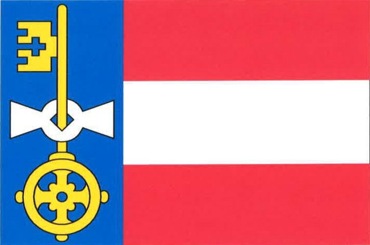 vlajka, Kočov, okres Tachov